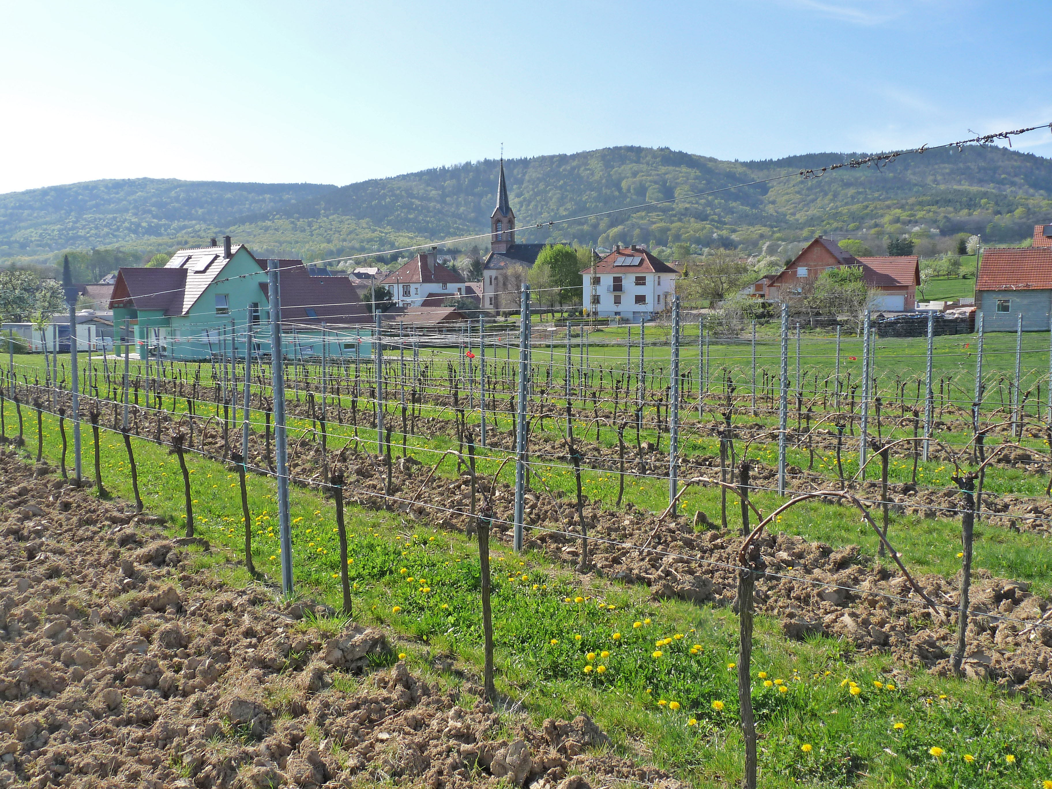 Vignoble de Cleebourg (Bas-Rhin) en avril